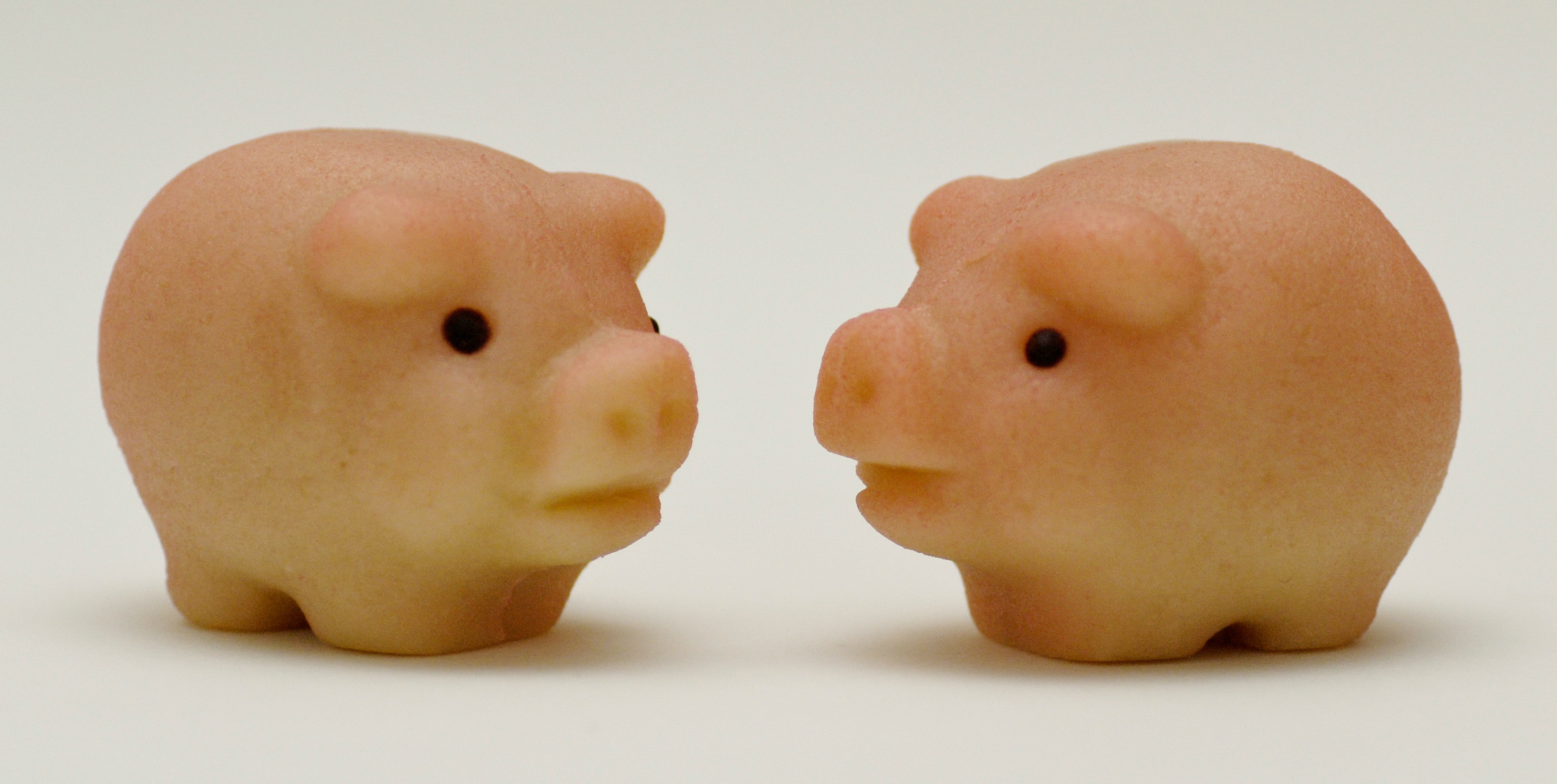 Marzipanschwein